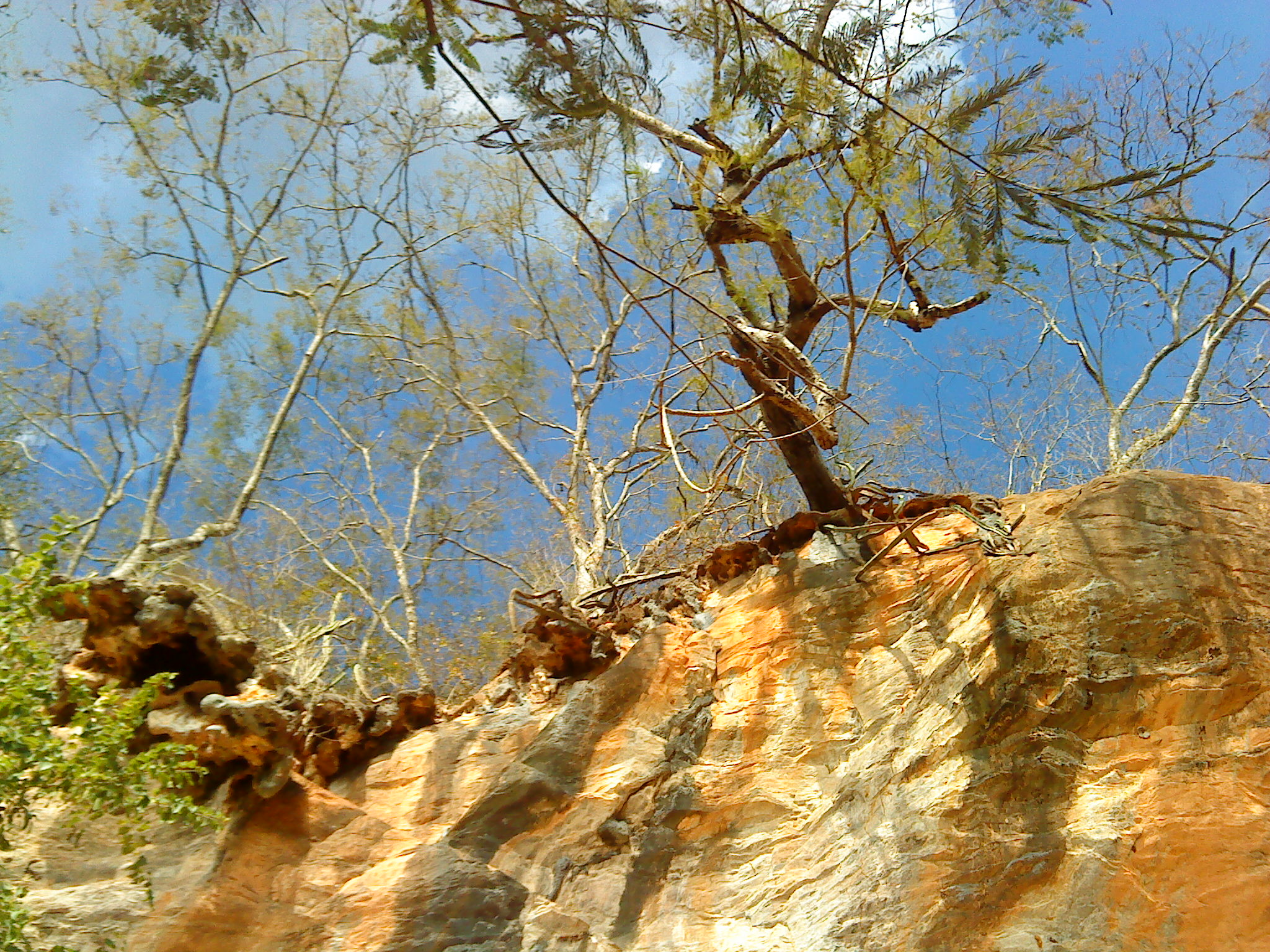 Árvore pendurada no paredão do parque Sumidouro